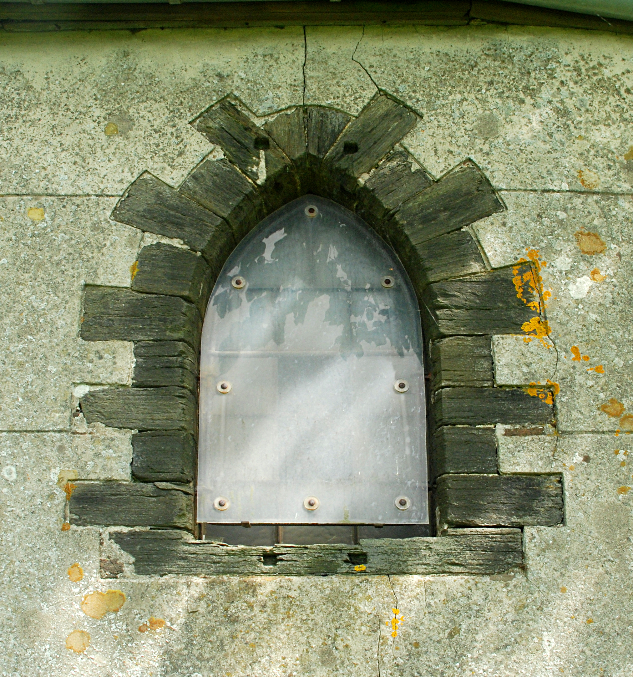 Belgique - Brabant wallon - Villers-la-Ville - Marbais - Chapelle Notre-Dame Auxiliatrice du Triolet